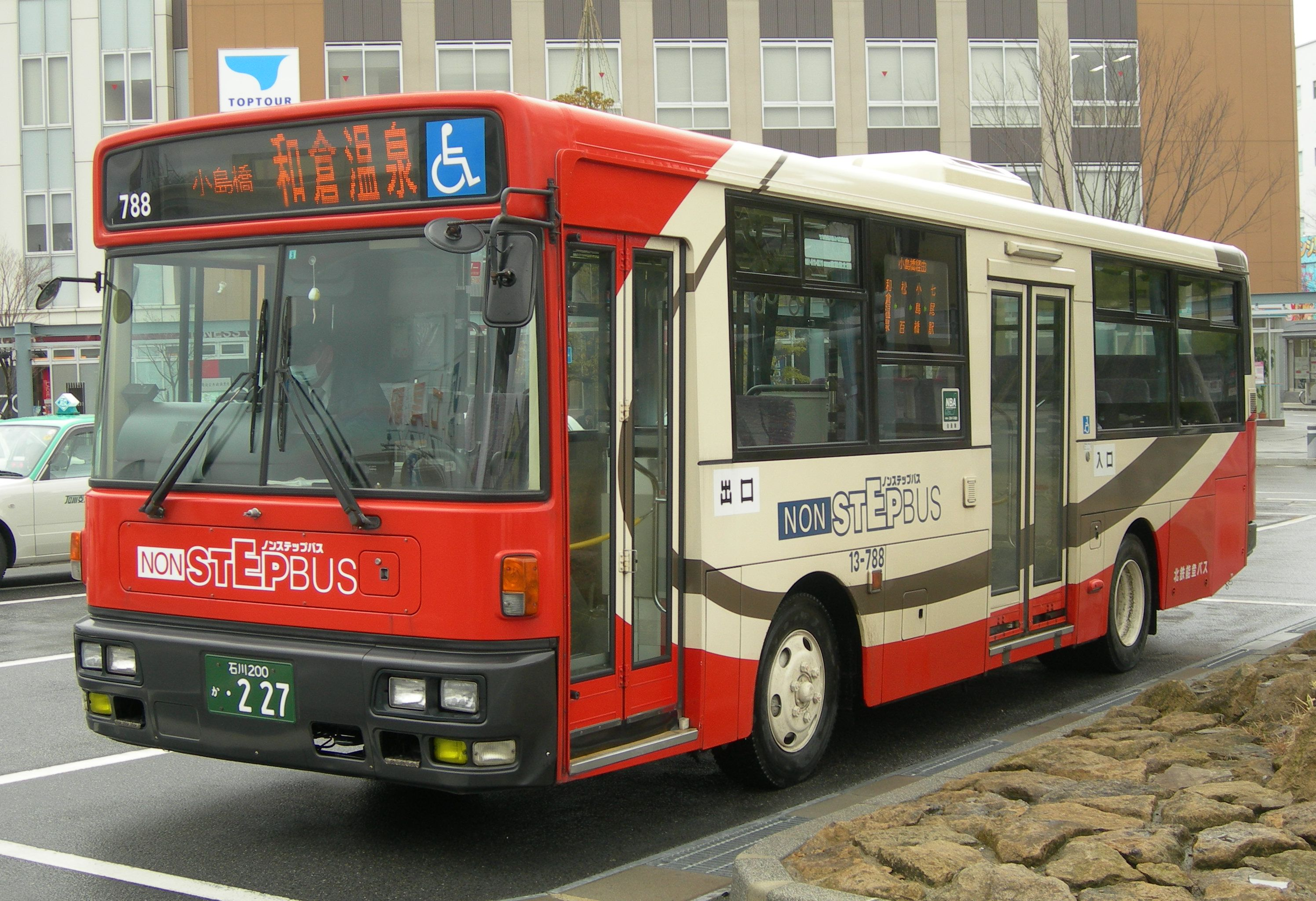 KK-RM252GAN改 2003年式 北鉄能登バス 社番13-788七尾営業所配置